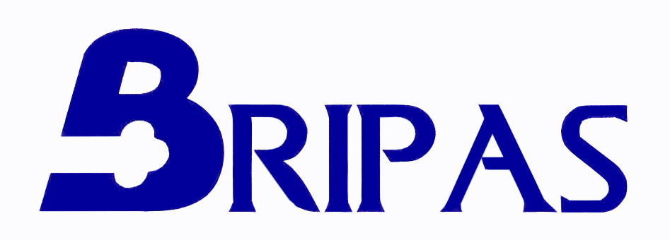 Logotipo de las Brigadas de Investigación de Incendios del Principado de Asturias